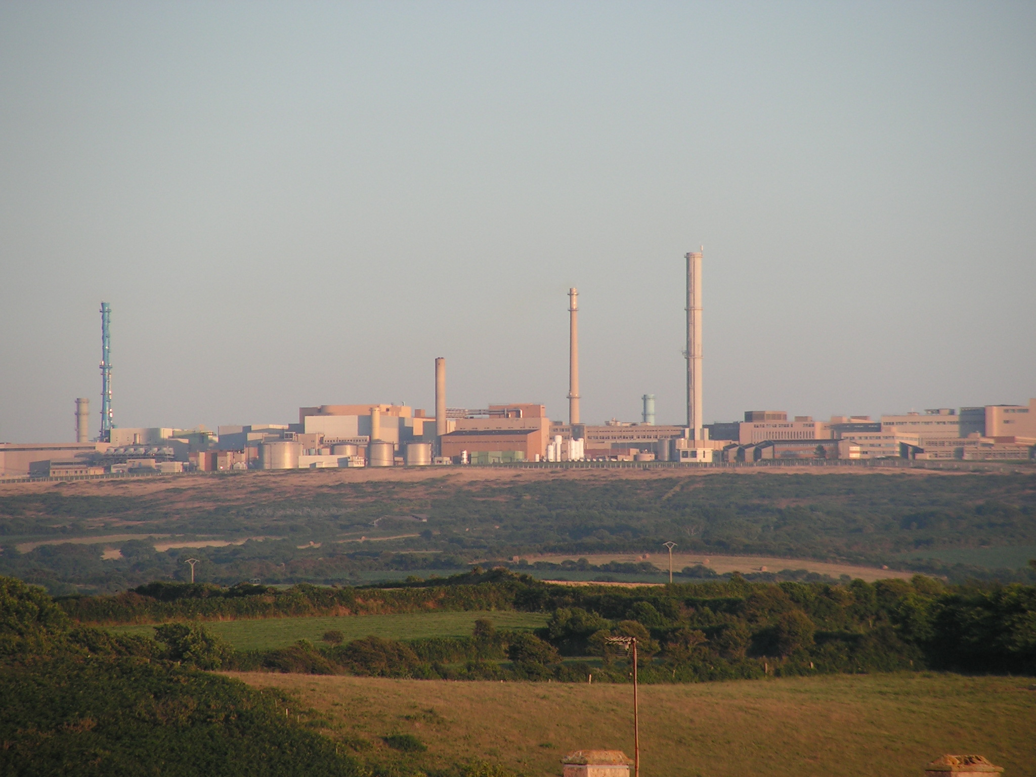 Usine de retraitement de la Hague. Camera: Konica Minolta DiMAGE Z10